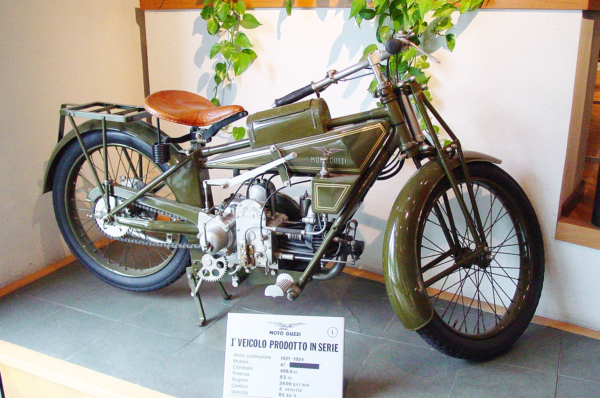 Moto Guzzi Tipo Normale 1921 - Présente dans le halle d'entrée des bureaux de Moto Guzzi à Mandello